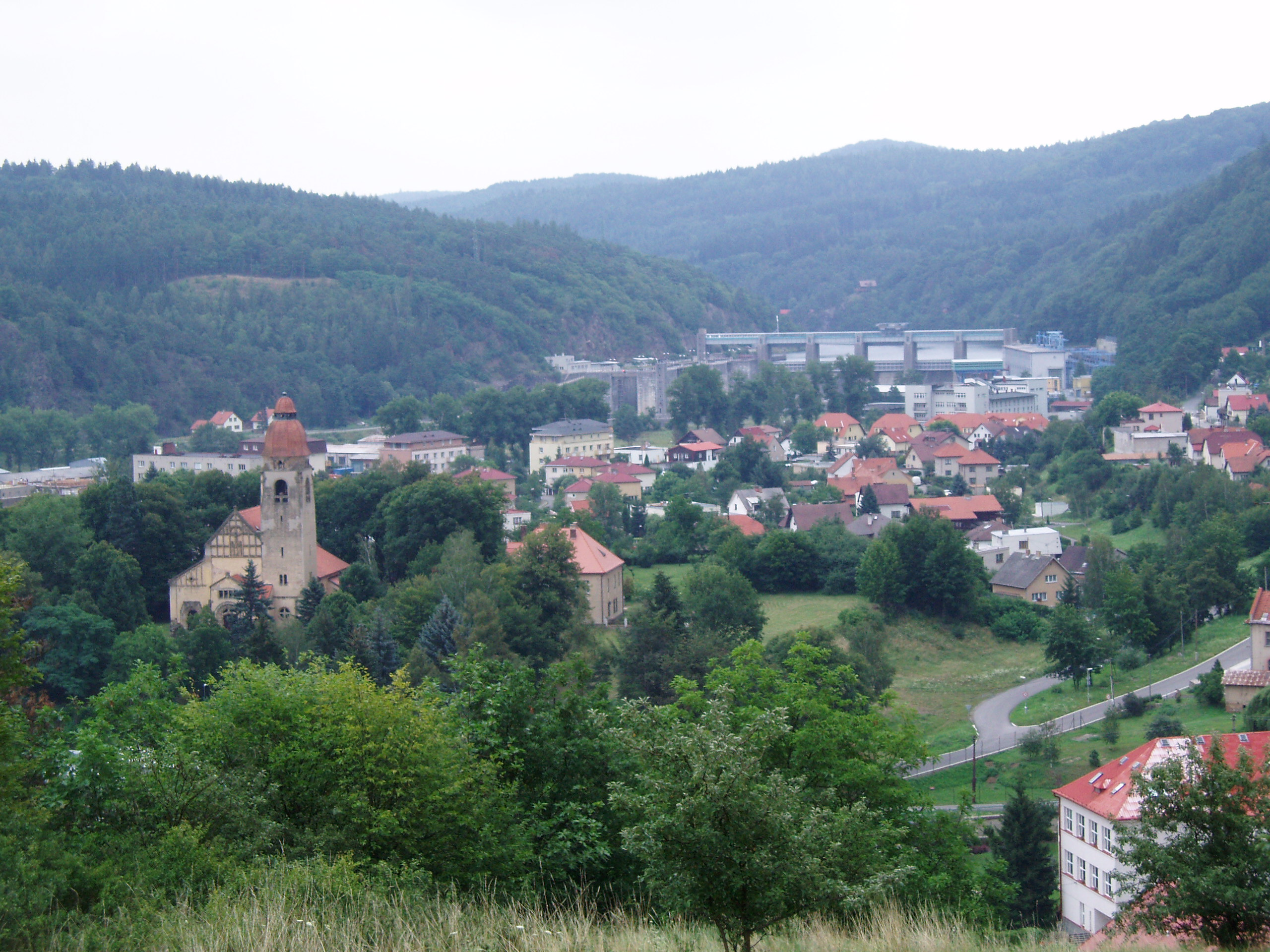 Stechovice - Czech republic